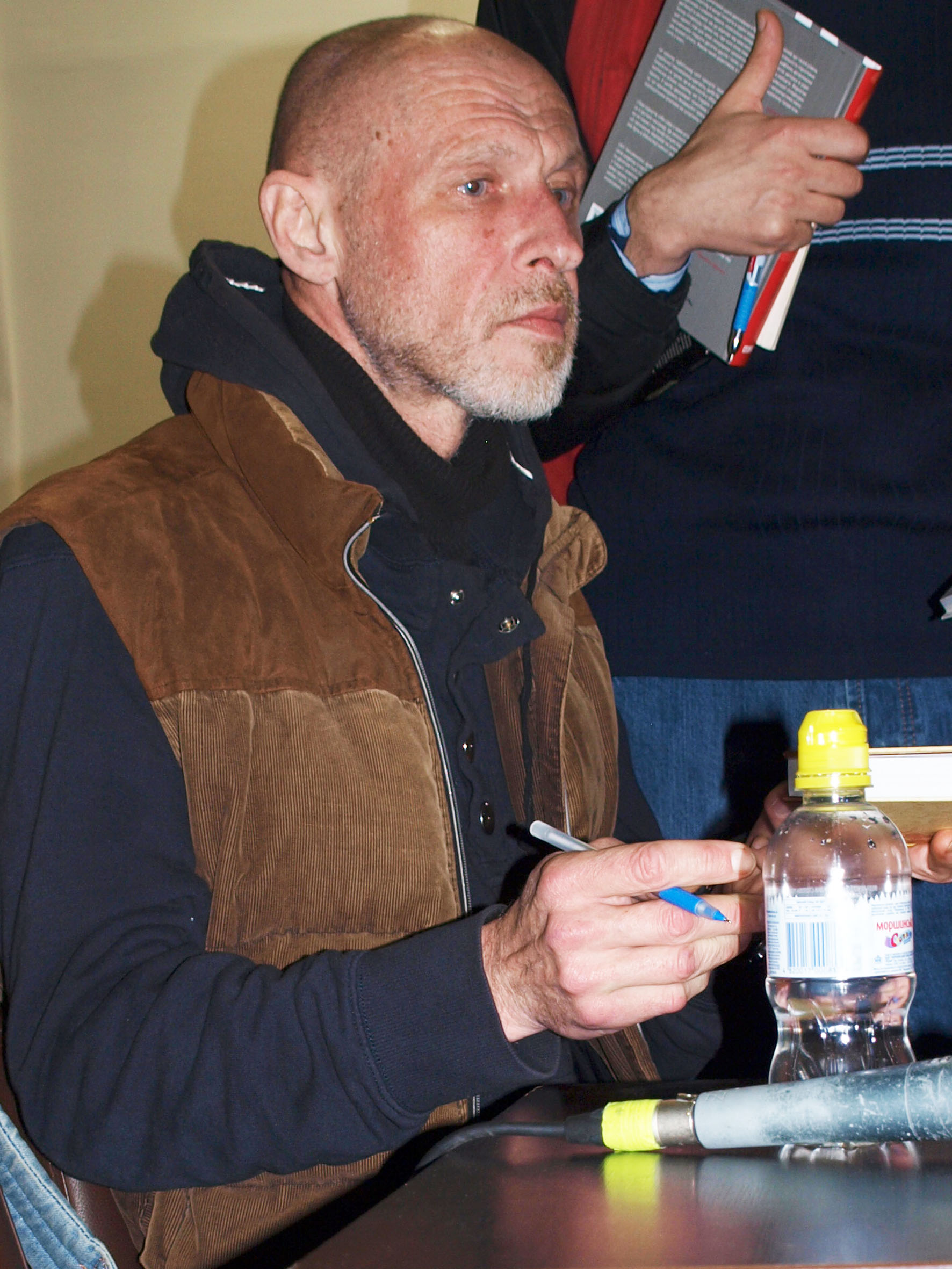 Юрко Іздрик на "Книжковому Арсеналі" в Києві